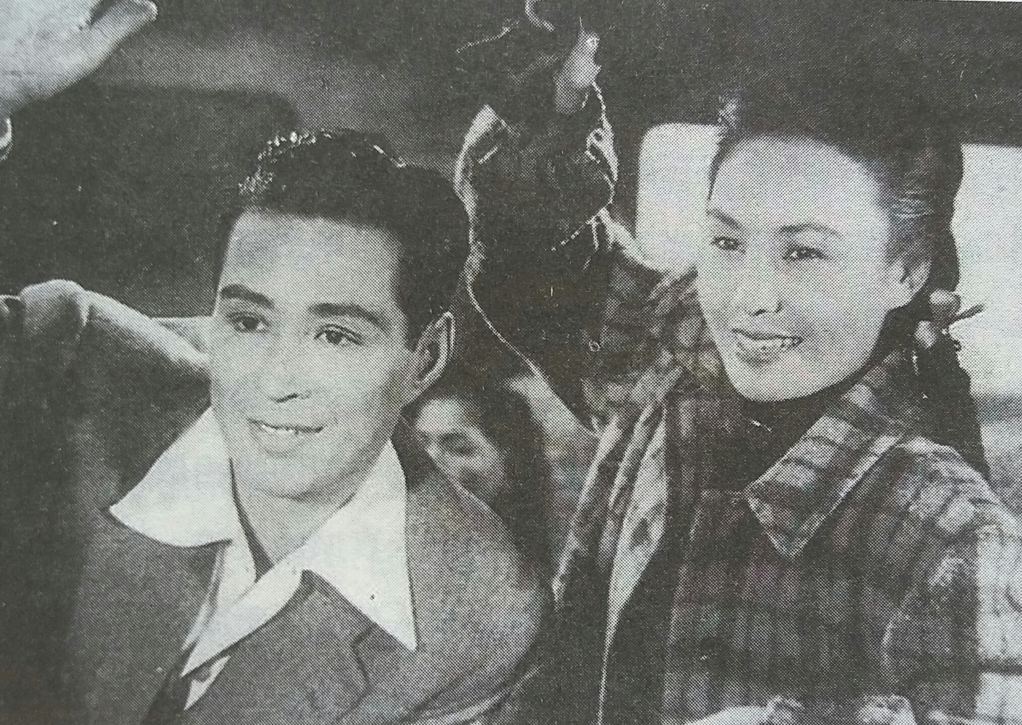 金焰与白杨在《范成龙快婿》中的剧照